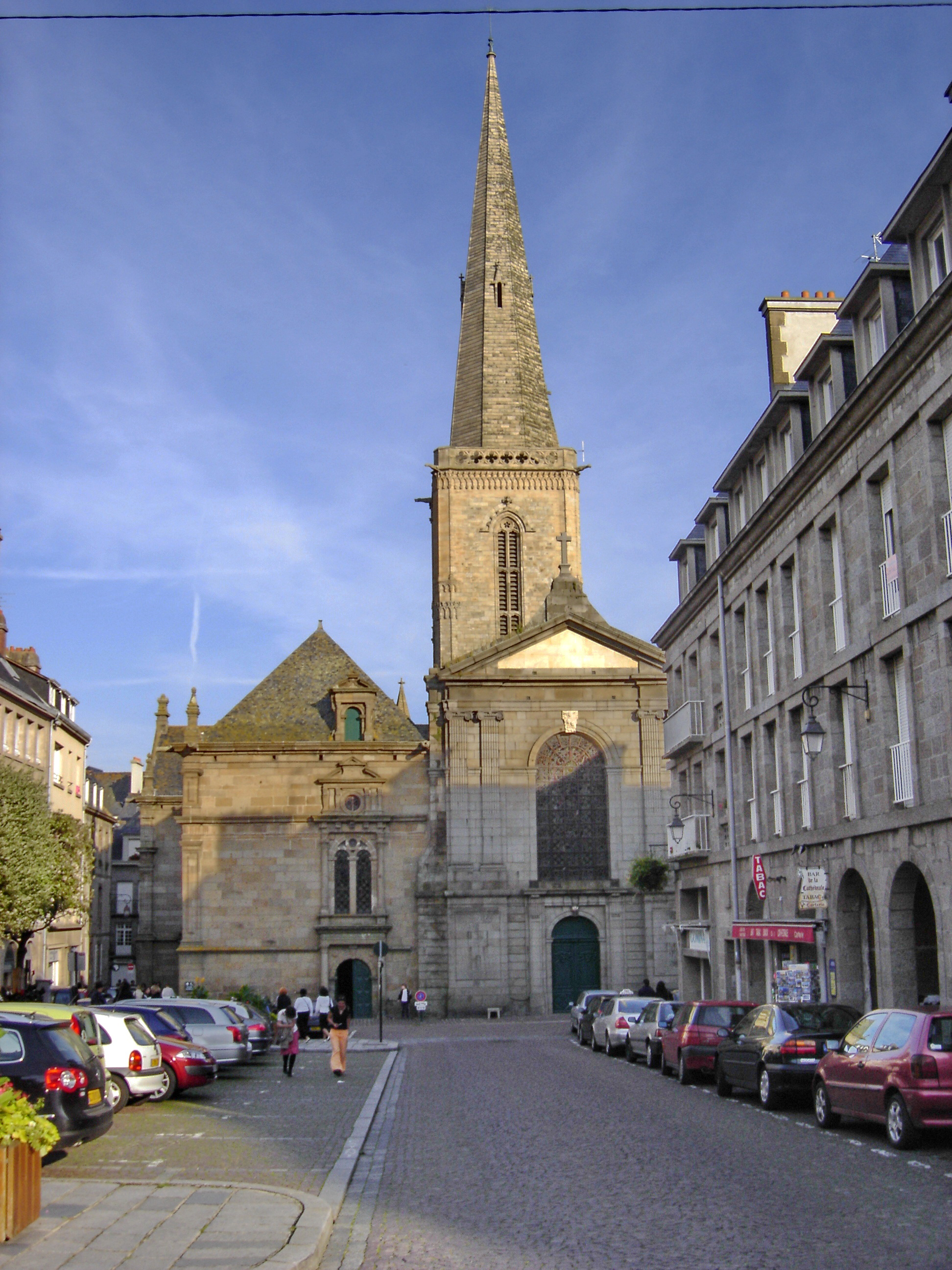 Cathédrale de Saint-Malo (France)